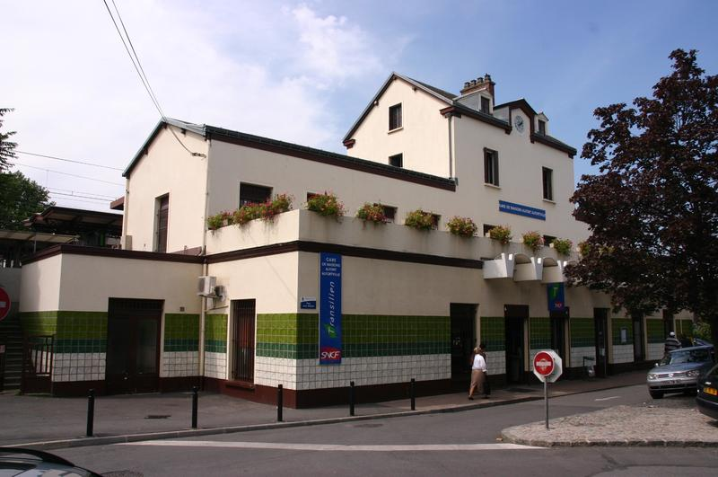 Maisons-Alfort-Alfortville. Le batiment Vogageurs côté Maisons-Alfort